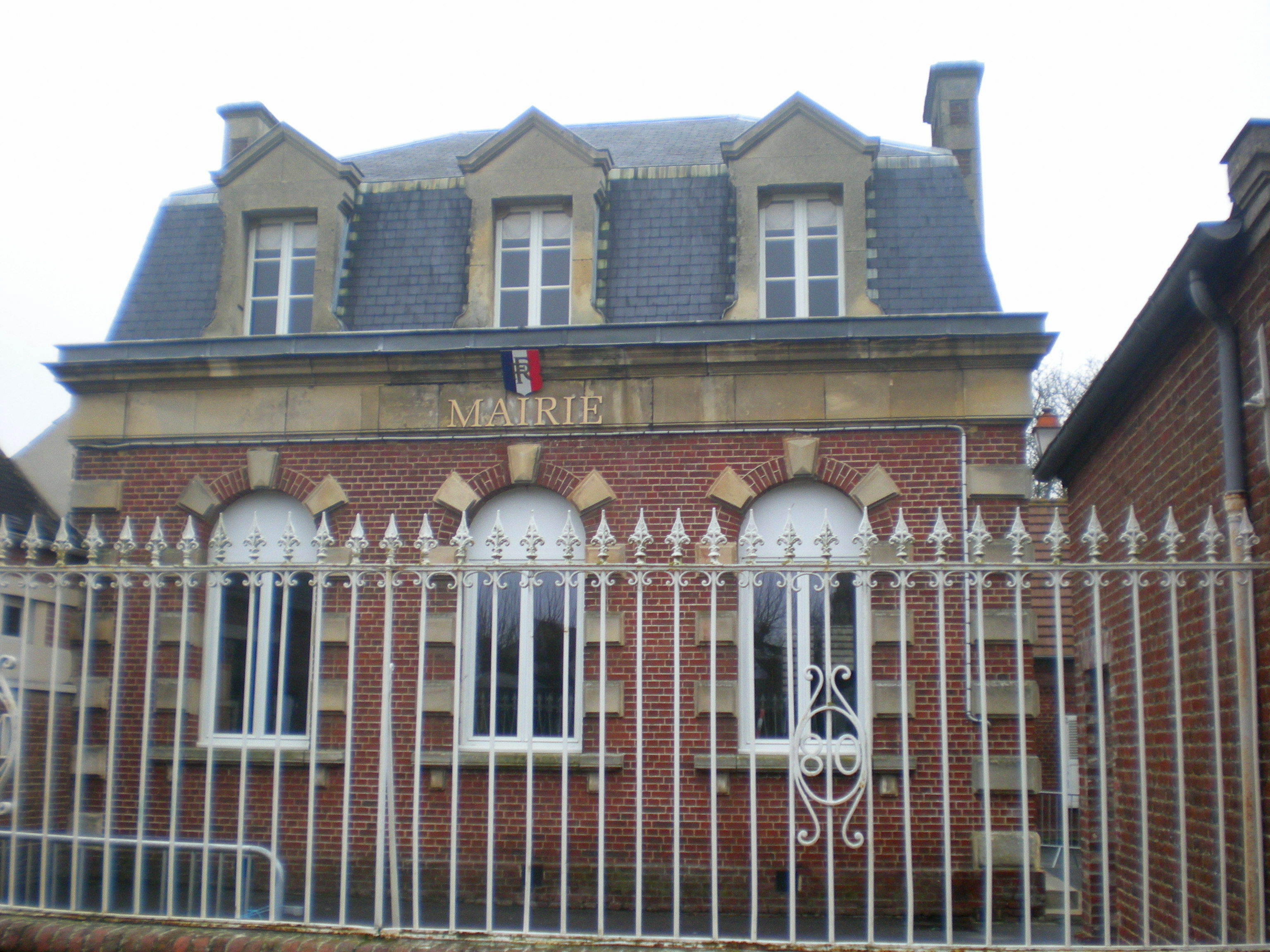 La mairie de Litz (Oise).